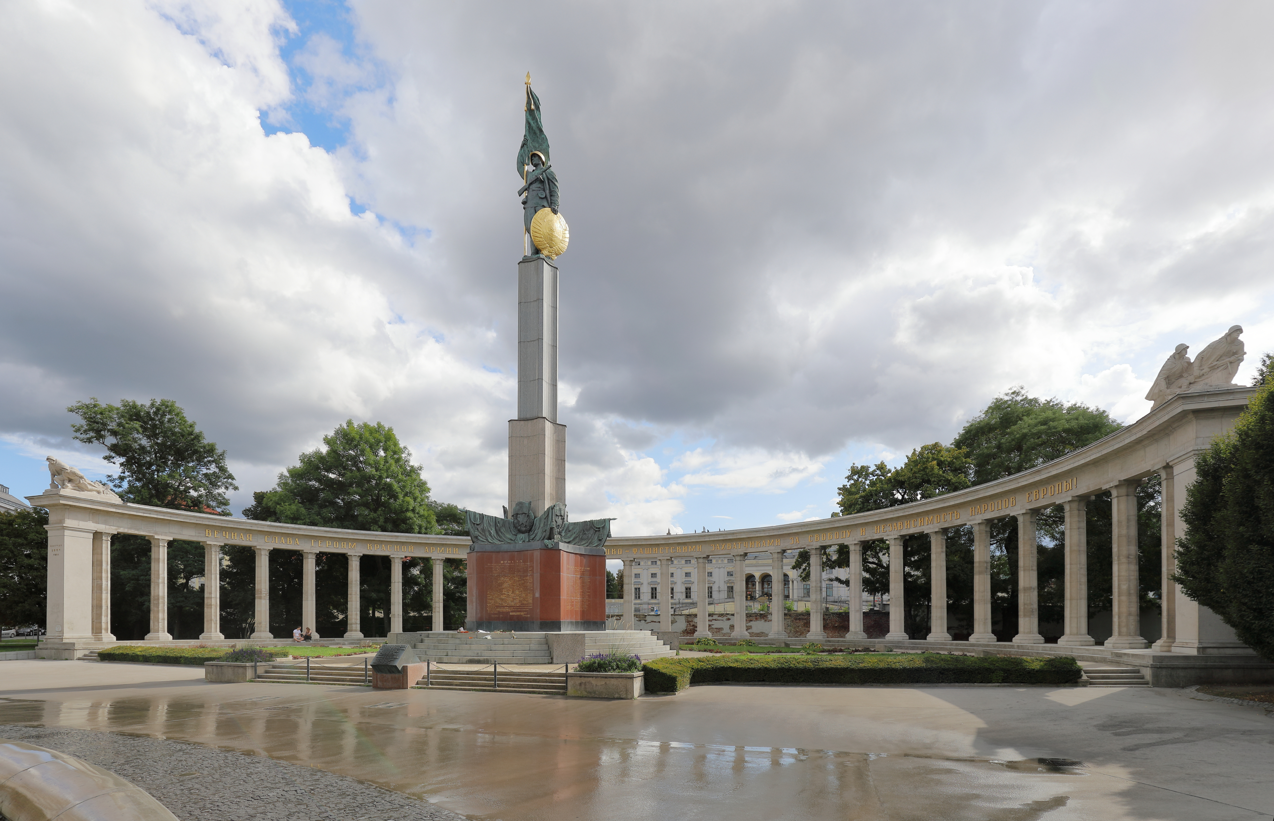 Nordwestansicht des Denkmals zu Ehren der Soldaten der Sowjetarmee (auch Heldendenkmal der Roten Armee bzw. umgangssprachlich Russendenkmal bezeichnet) am Schwarzenbergplatz im 3. Wiener Gemeindebezirk Landstraße.Das Denkmal erinnert an 18.000 Soldaten der Roten Armee, die bei der Eroberung Wiens zu Tode gekommen sind und wurde am 19. August 1945 feierlich enthüllt. Es besteht aus einer acht Meter hohen Balustrade mit 26 Säulen, an deren Enden je eine Gruppe von zwei Kämpfenden angebracht wurde. Im Zentrum befindet sich auf einem 20 Meter hohen Sockel eine 12 Meter hohe Statue eines Rotgardisten.